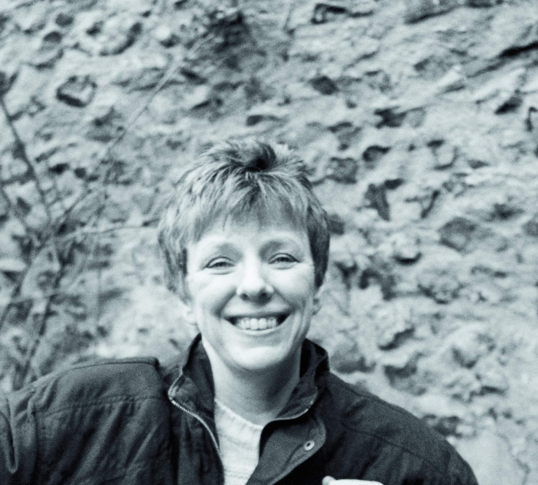 Eva Weissweiler